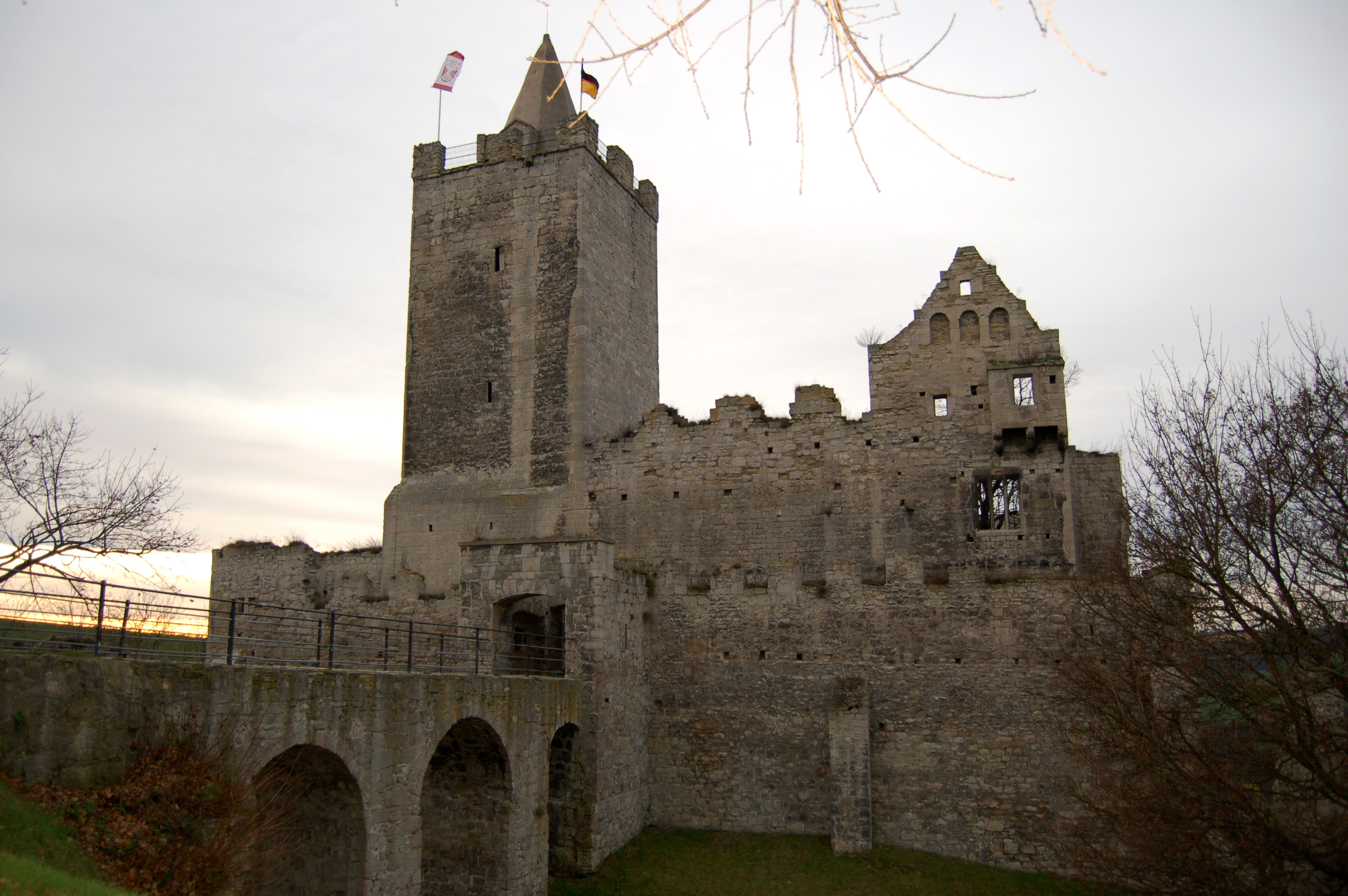 Rudelsburg bei Bad Kösen